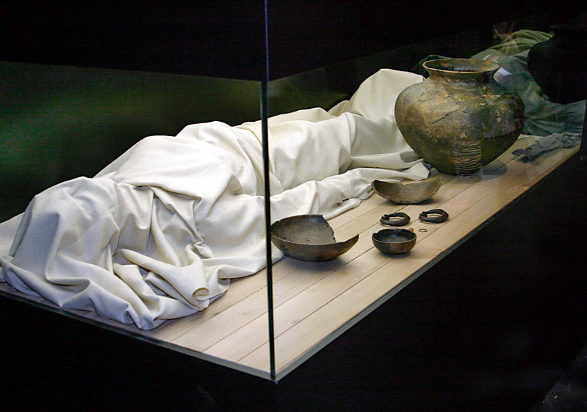 Präsentation des Hallstattzeitlichen Frauengrabes in der Taberna archaeologica, 7. Jahrhundert v. Chr.